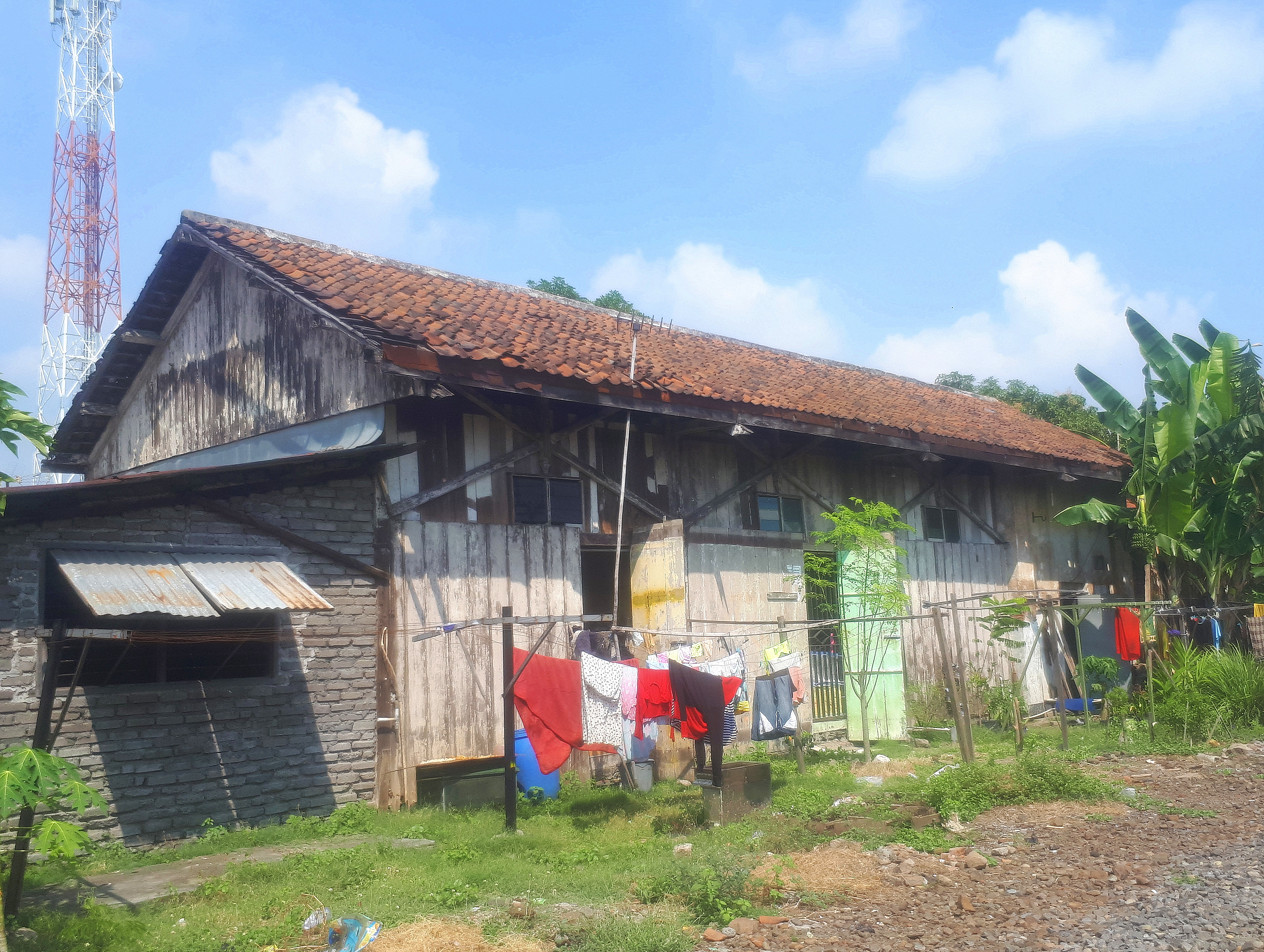 Stasiun Gununggangsir adalah stasiun nonaktif yang berada di Kabupaten Pasuruan, kini beralih fungsi menjadi tempat tinggal penduduk, 2020